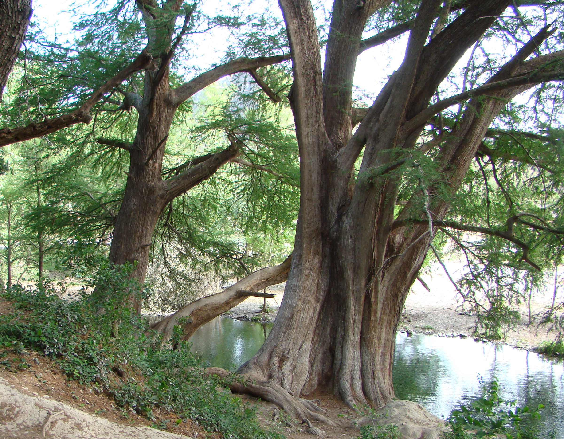 Taxodium mucronatum, La Turbina, Sabinas Hidalgo, Nuevo León, Mexico